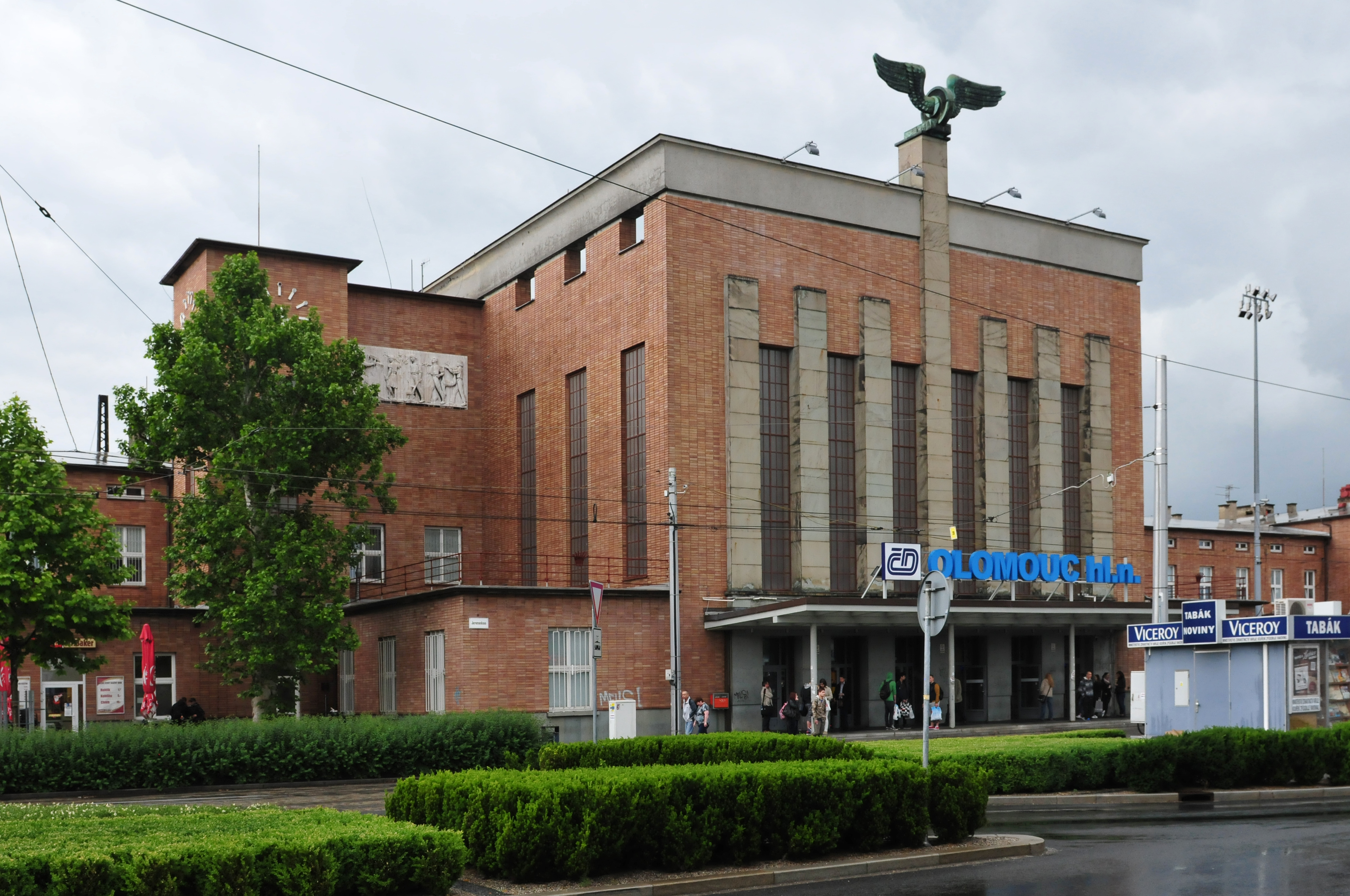 Olomouc hlavni nadrazi